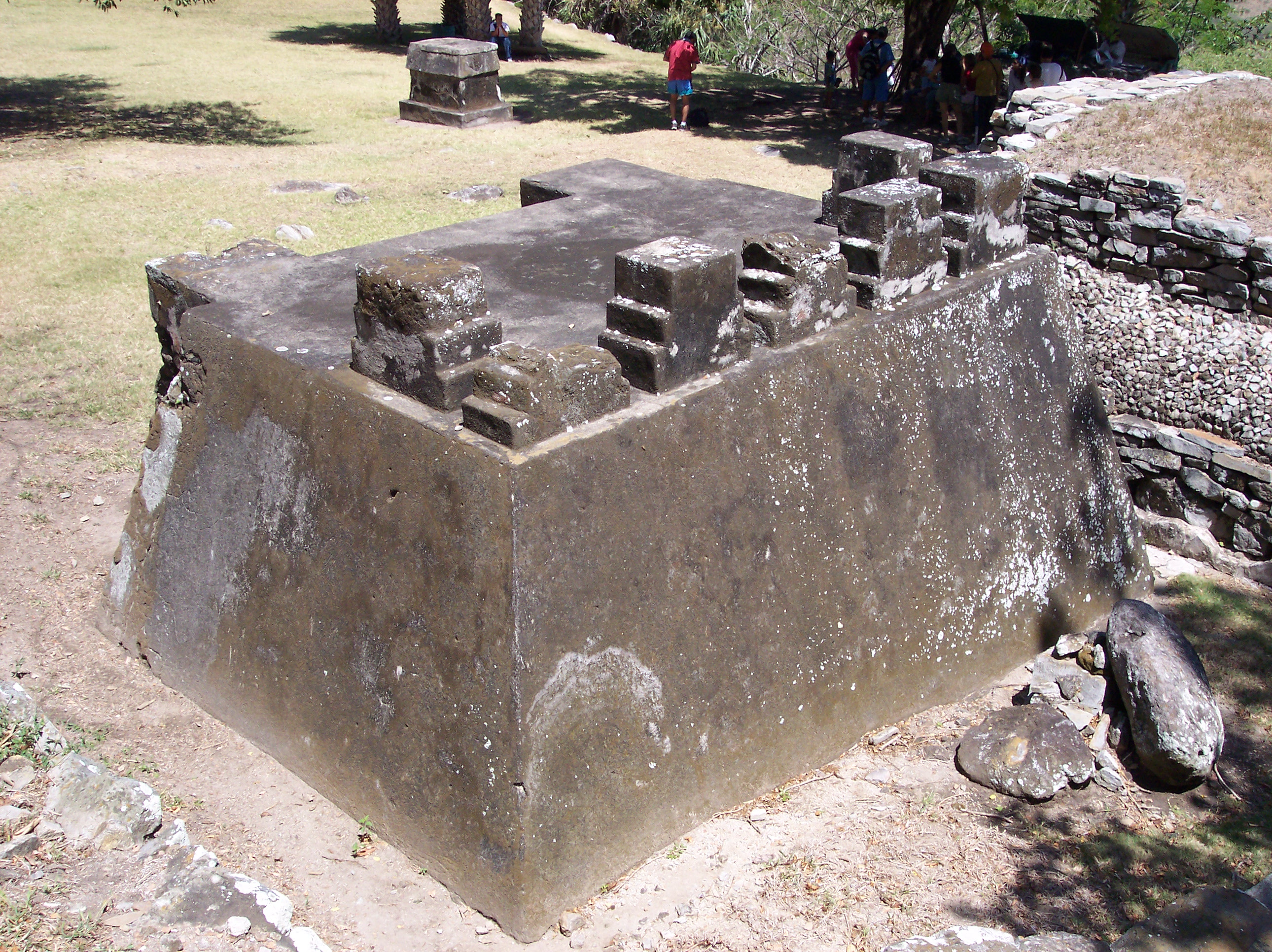 Note: Details about the photo are pending. Archeological Site Quiahuiztlan. Located in the Actopan Municipality, Estate of Veracruz, Mexico. SPANISH: Sitio Arqueológico Quiahuiztlán, Localizado en el Municipio de Actopan, Estado de Veracruz, México.